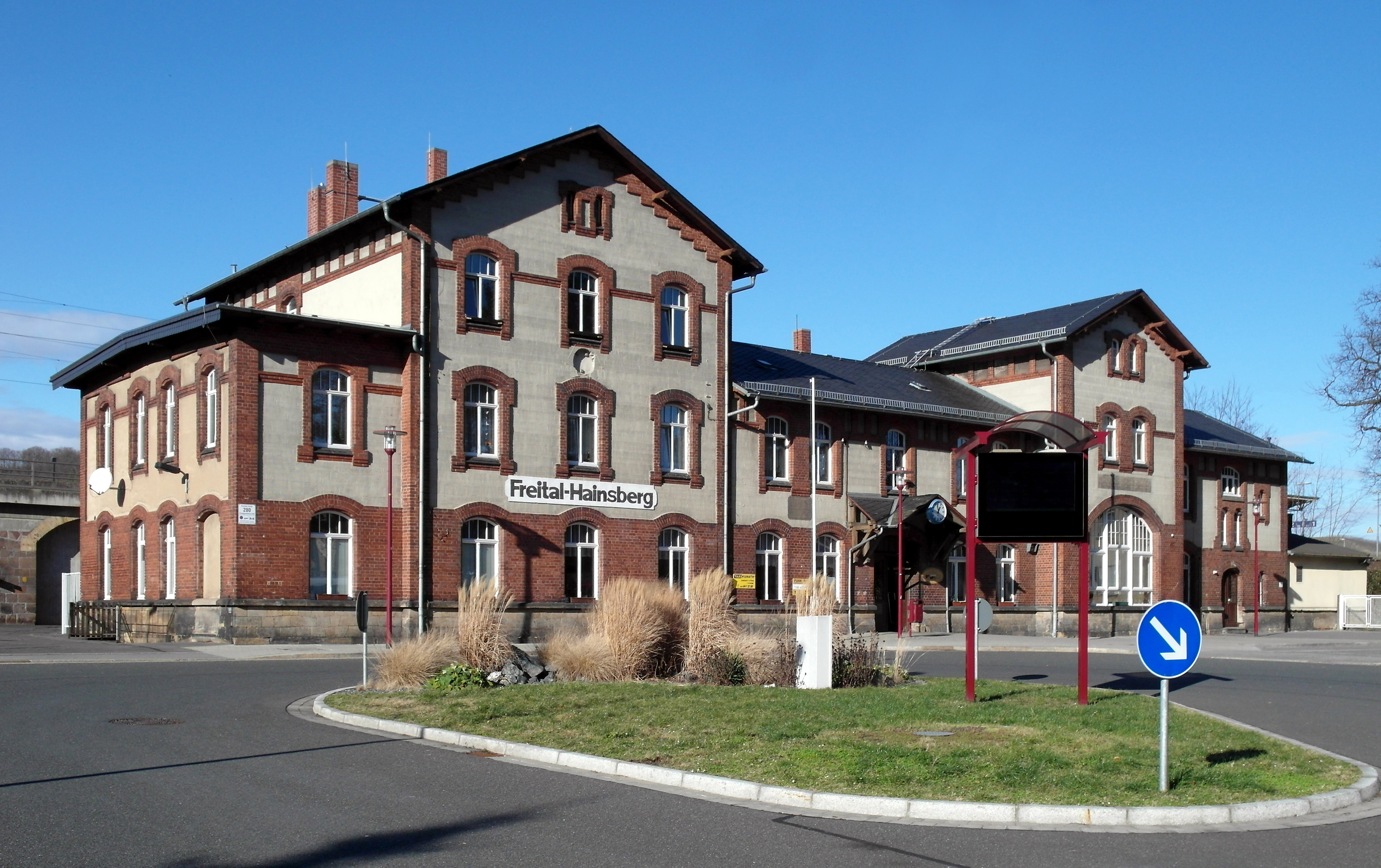 02.02.2018 01705 Freital-Hainsberg, Dresdner Straße 280a (GMP: 50.988399,13.638035): Bahnhof für die regelspurige Sachsenmagistrale Dresden - Werdau und die Schmalspurbahn Freital-Hainsberg nach Kippsdorf im Erzgebirge. Das Bahnhofsgebäude wurde 1904 neu errichtet. [SAM3735.JPG]20180202305DR.JPG(c)Blobelt